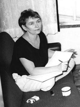 Title: Berlin, Besetzung Stasizentrale, Bärbel Bohley People in the image: Bohley, Bärbel: Malerin, Bürgerrechtlerin, Mitbegründerin Neues Forum, DDR Factual corrections and alternative descriptions are encouraged separately from the original description. Additionally errors can be reported at this page to inform the Bundesarchiv. Original historic description: ADN- Thomas Uhlemann 5.9.90 Berlin: Die 22 Bürgerrechtler, die seit dem 4.9.90 mehrere Büroräume der ehemaligen Stasizentrale in der Ruschestraße besetzt halten, wollen solange dort bleiben, bis ihre Forderungen erfüllt sind. Zu der Gruppe gehören Mitglieder des Neuen Forum - hier Bärbel Bohley - sowie Vertreter des Staatlichen Komitees zur Auflösung des AfNS, der Umwelt-Bibliothek Berlin, des ehemaligen Bürgerkomitees Normannenstraße, der Vereinigten Linken sowie "mündige Bürger".